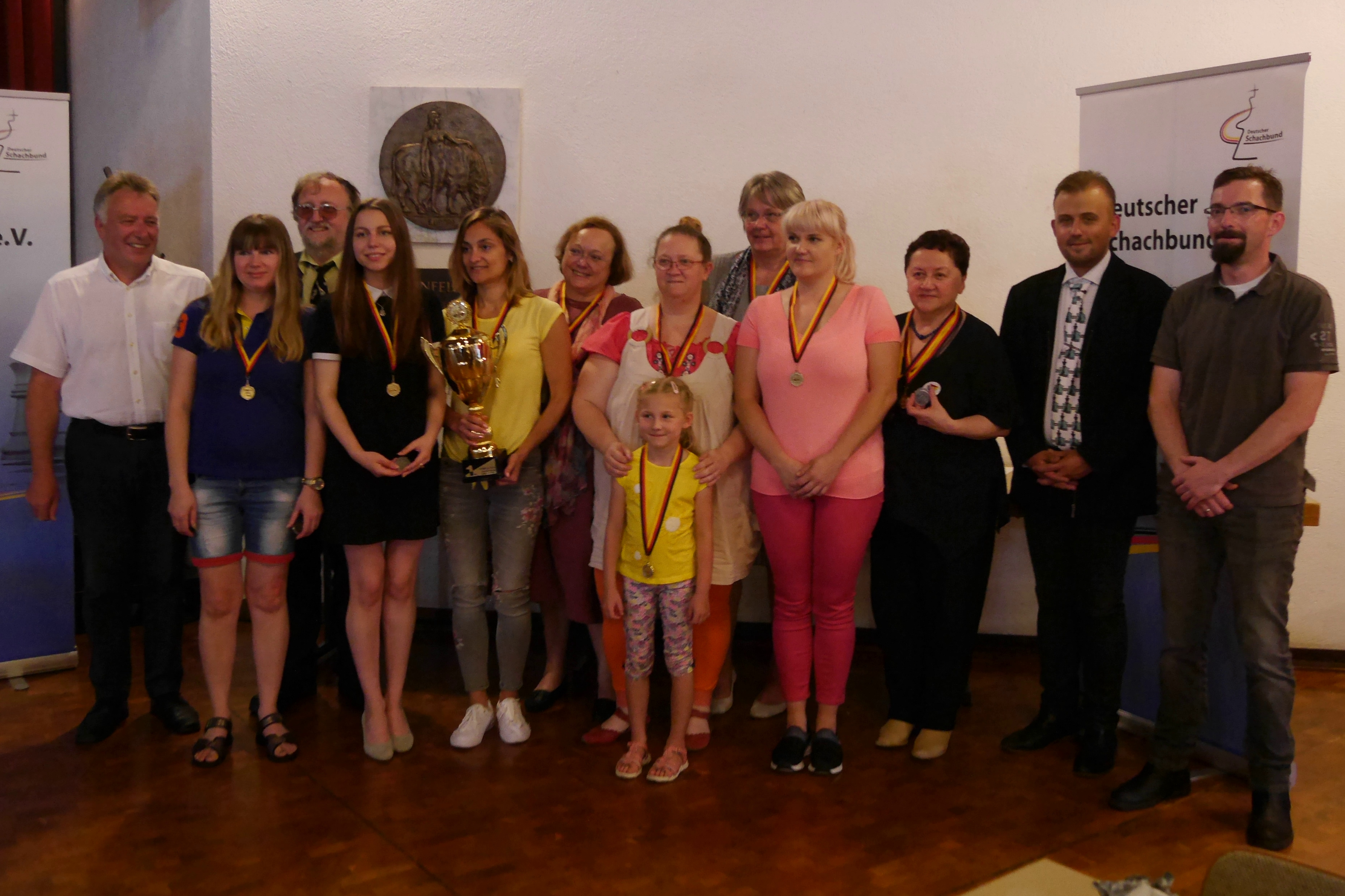 Württemberg 1, Erster der Deutschen Frauen-Mannschaftsmeisterschaften der Landesverbände im Schach 2018 in Braunfels.